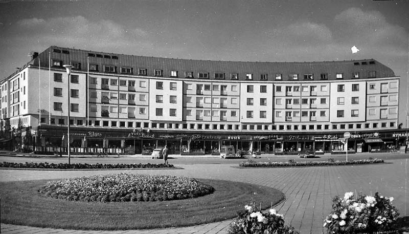 Spektrumhuset.; Affärshus; Byggnadsverk; Handel och bankväsen